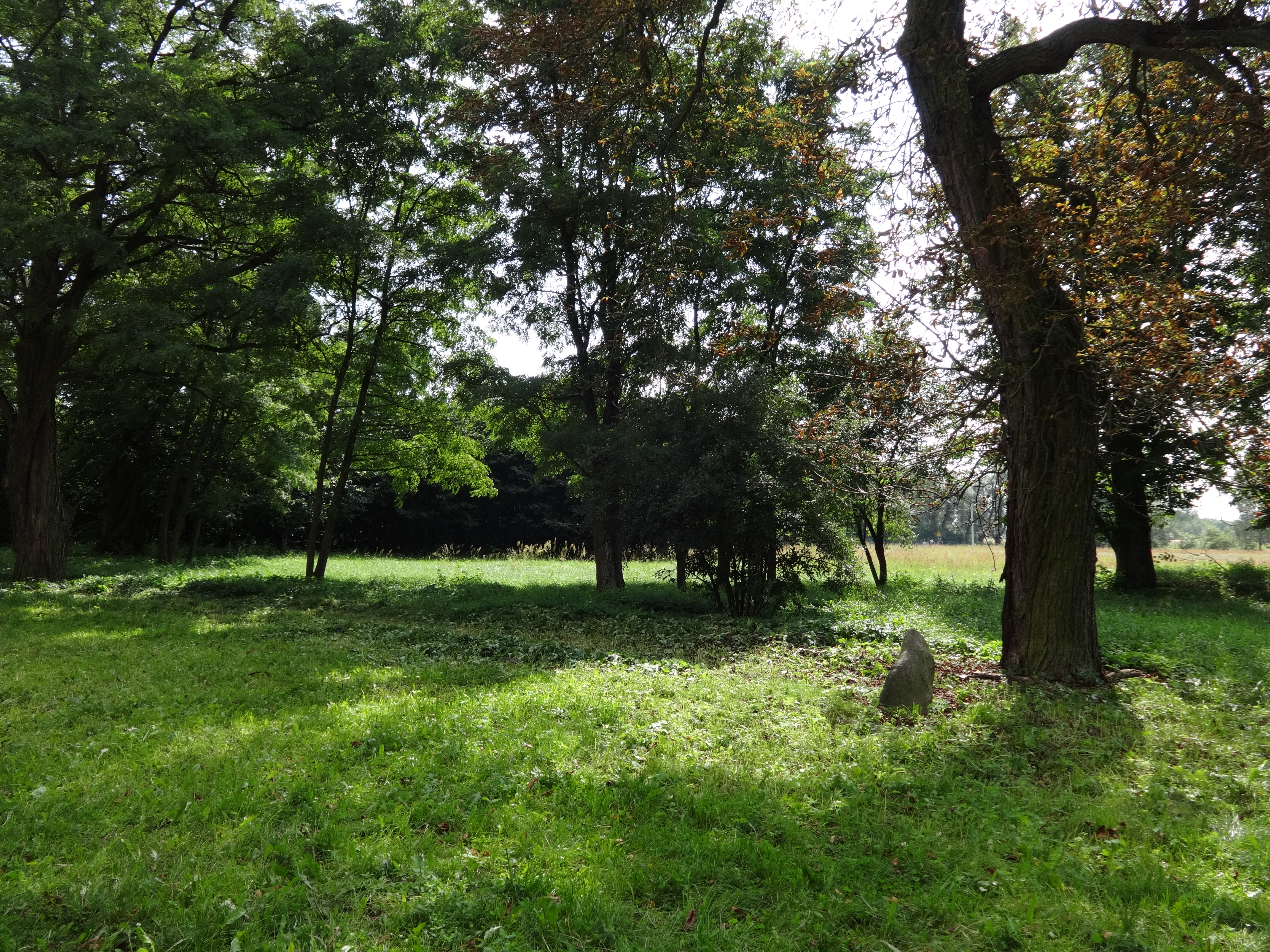 Ciężkowice, park, 2 poł. XIX